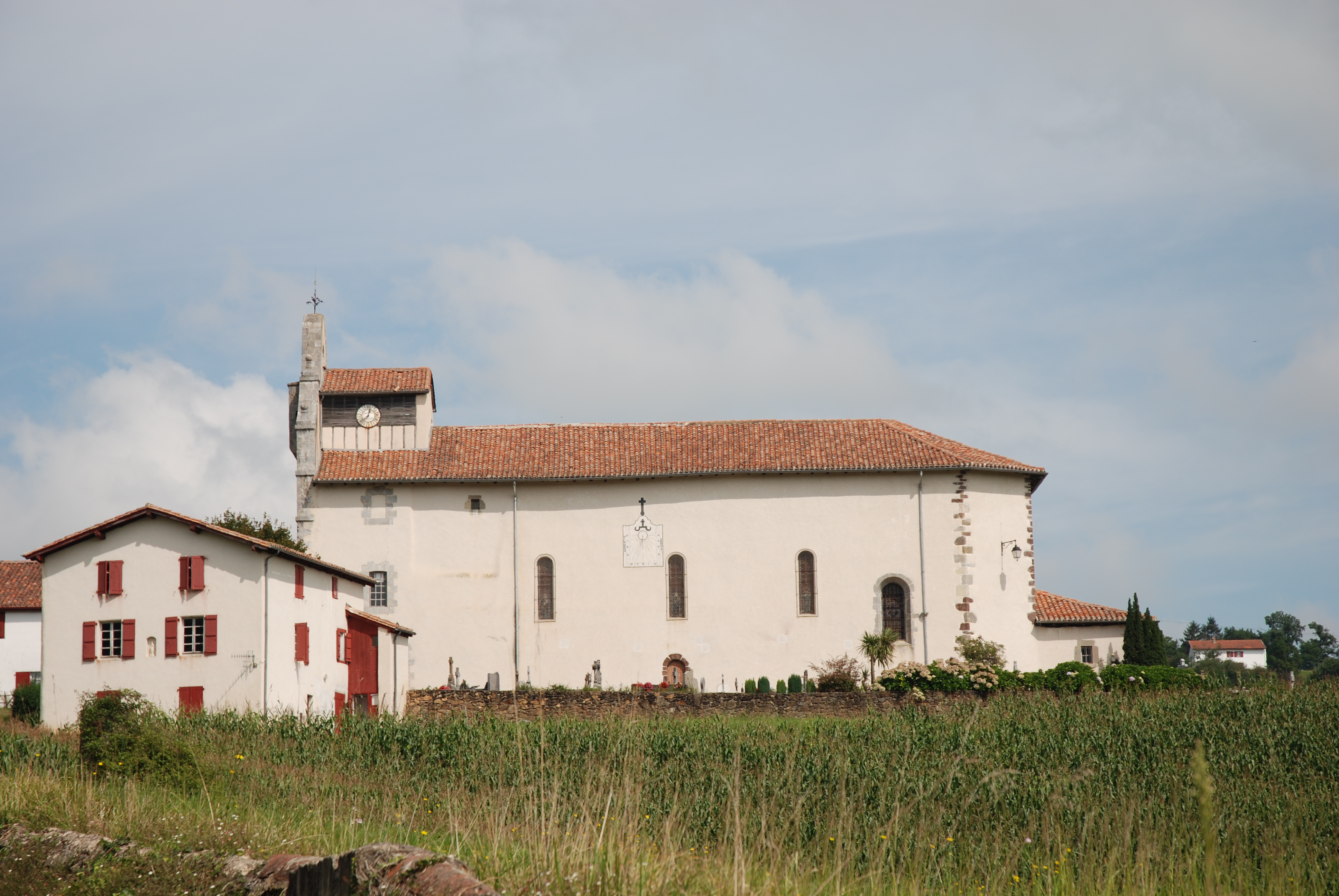 Mendionde, quartier Lekorne, église du XVième siècle, clocher-pignon